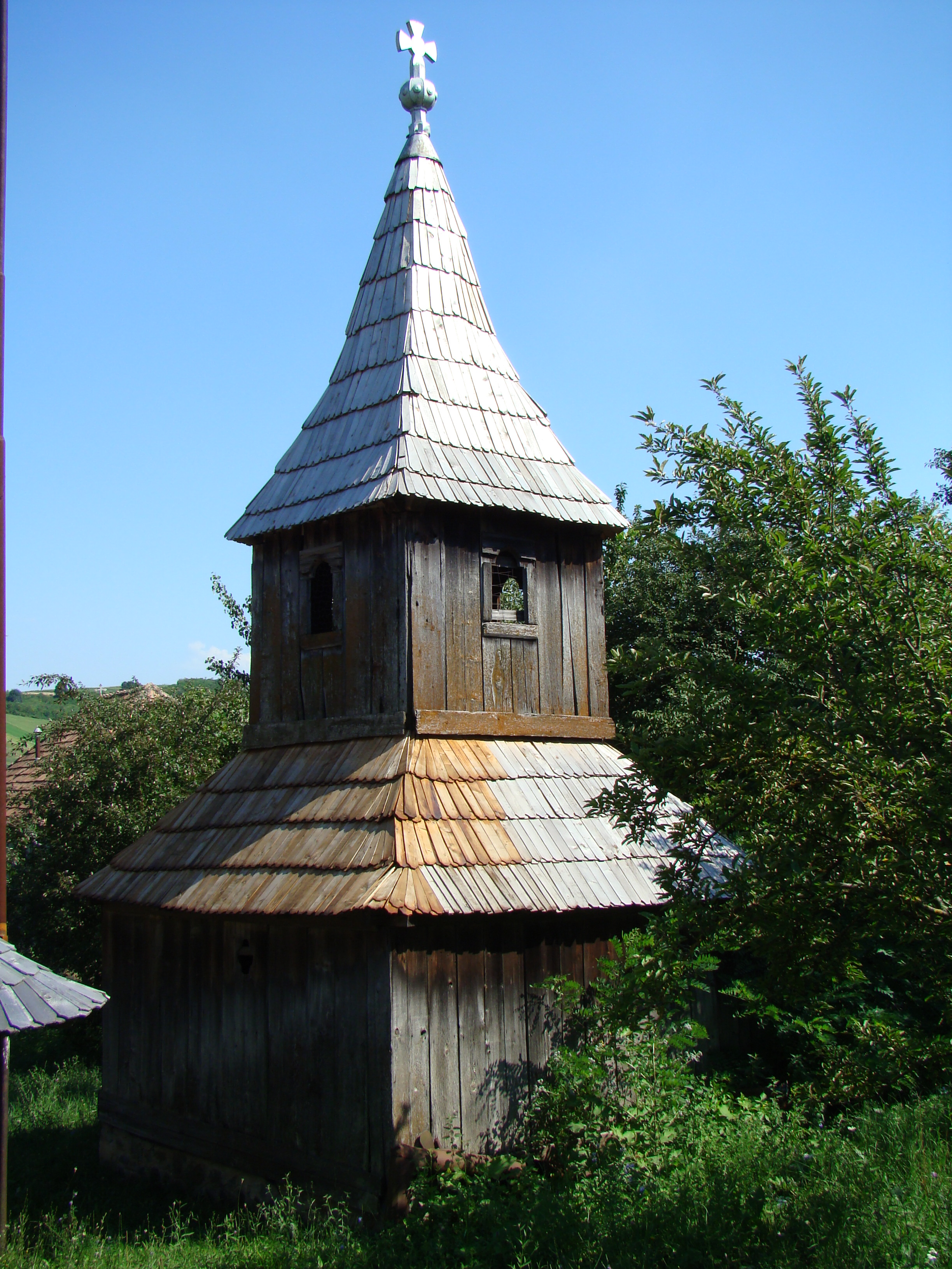 Biserica de lemn din Sărmășel-Gară 02